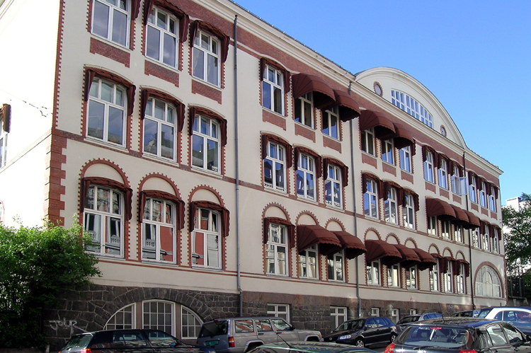 Hartvig Nissens skole (tidligere Nissens Pigeskole), Niels Juels gate 56, Oslo. Bygd 1898. Arkitekt: Henrik Nissen.